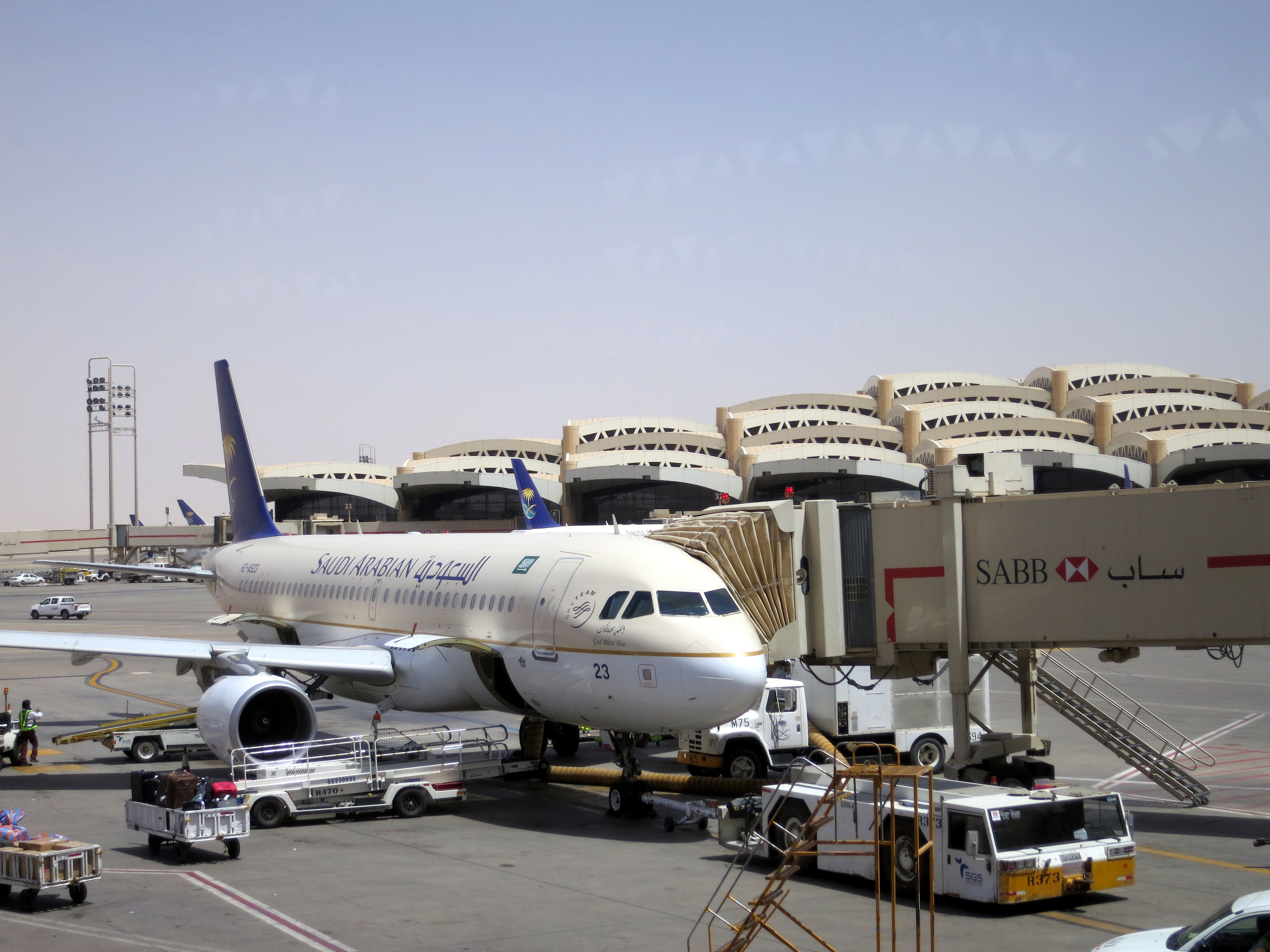 Saudi Arabian Airlines A320 (HZ-AS23) at Riyadh Airport